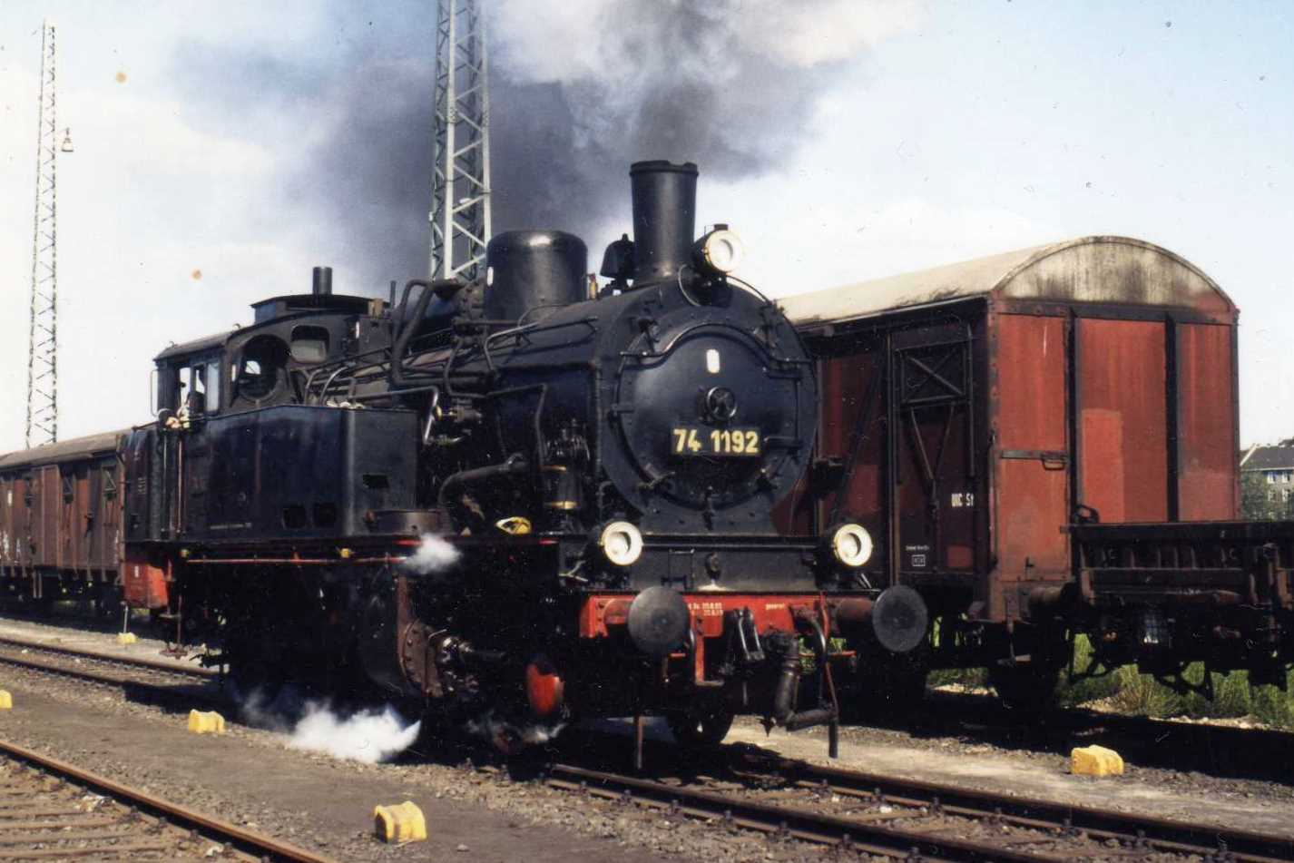 Dampflokomotive 74 1192 auf einem Bahnhofsfest im Güterbahnhof Köln-Gereon, dessen Abbruch gerade in den letzten Zügen lag.